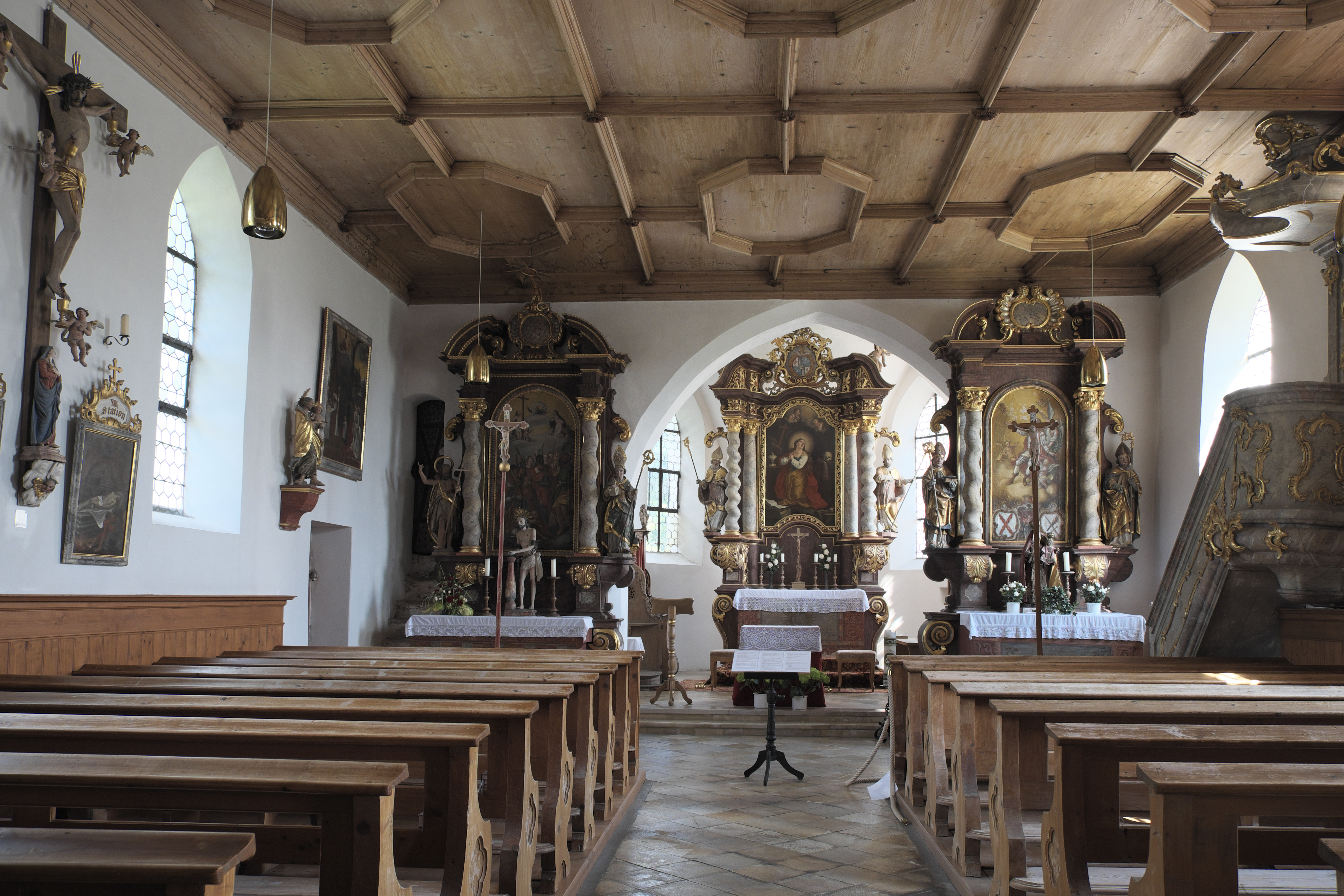 Katholische Filialkirche St. Maria Magdalena in Urspring, einem Ortsteil von Steingaden im Landkreis Weilheim-Schongau (Bayern/Deutschland), Innenraum